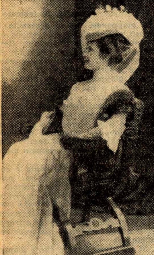 Nathalie de Goloubeff (1879-1941), compagna di Gabriele D'Annunzio nell'esilio di Arcachon. Nota anche come Donatella Cross.